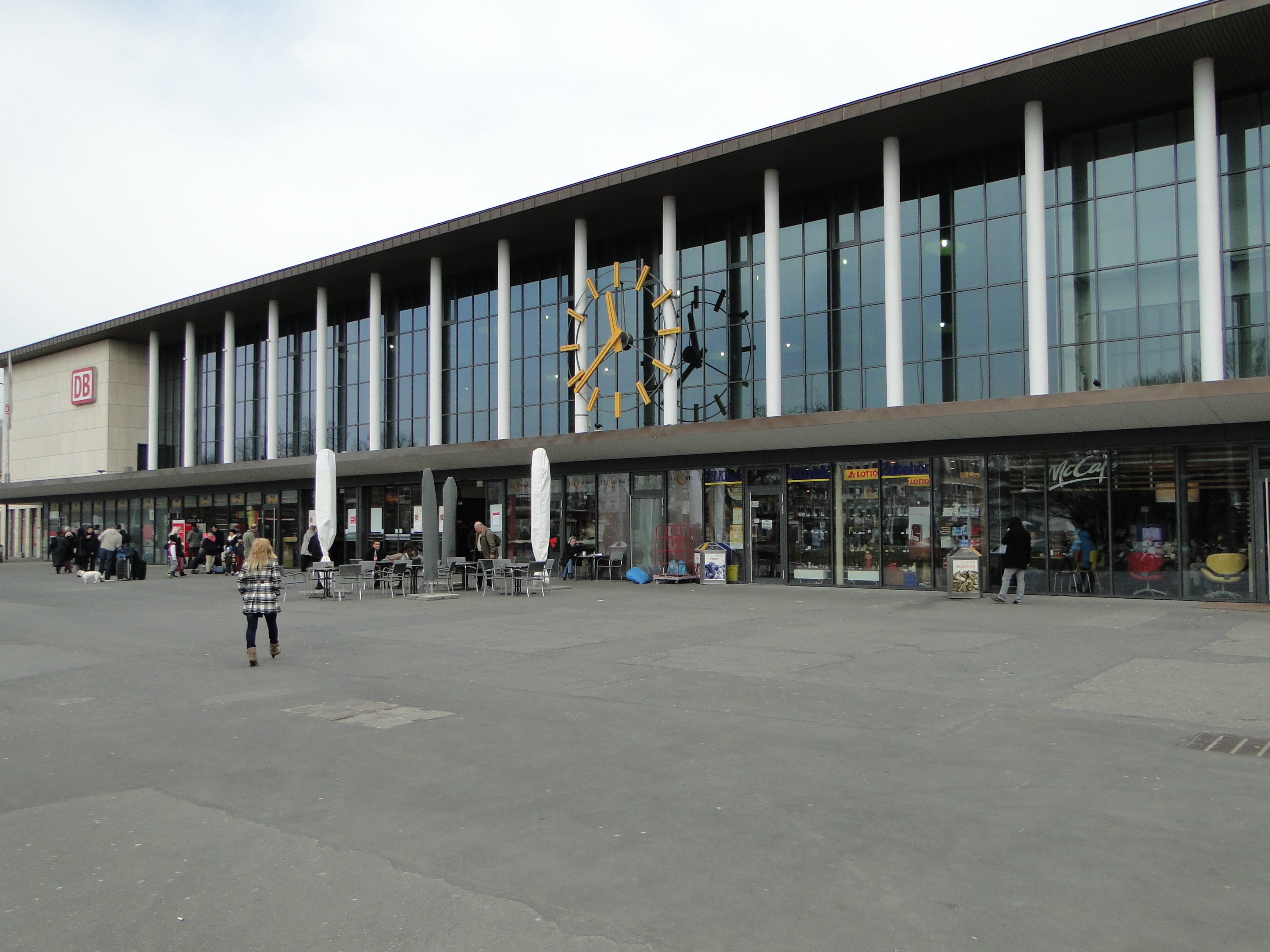 Würzburg 31.03.2013